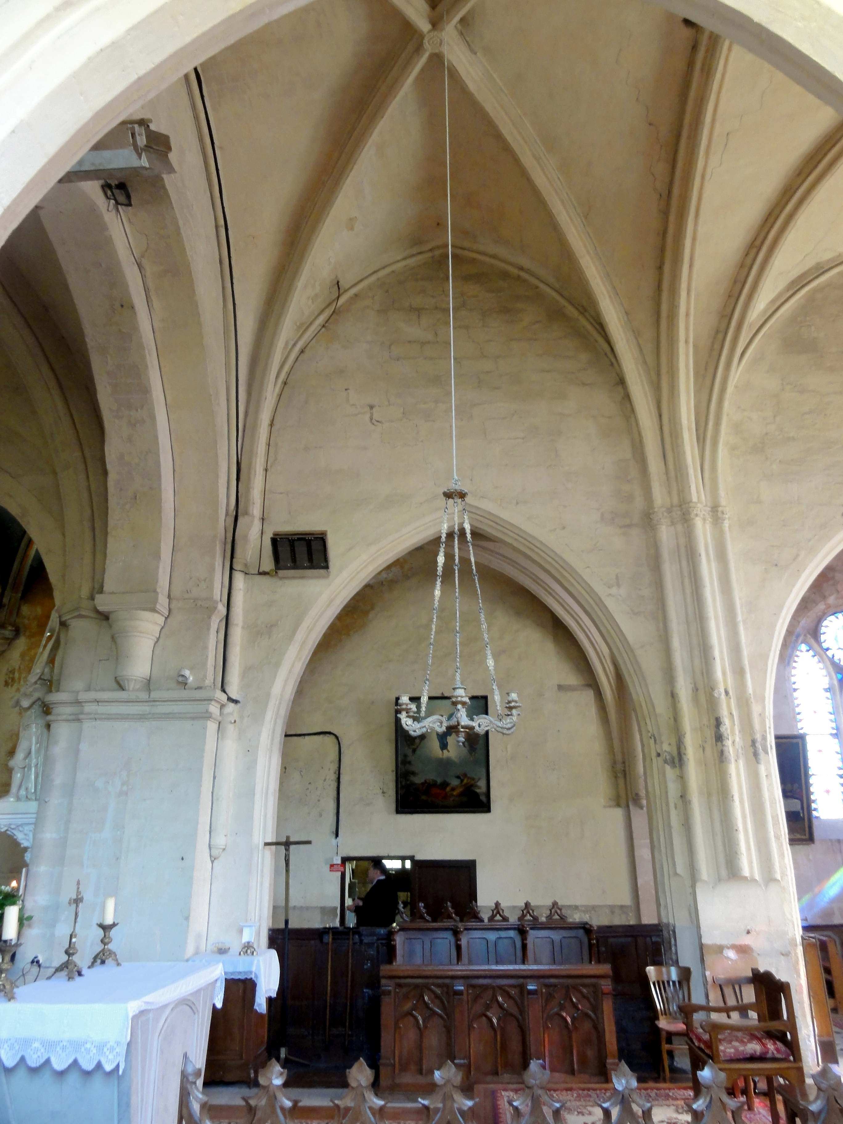 Intérieur de l'église Saint-Vaast de Nointel (voir titre).